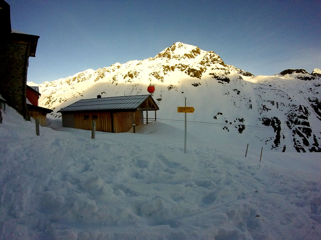 Bliggspitze and Taschachhaus Winter